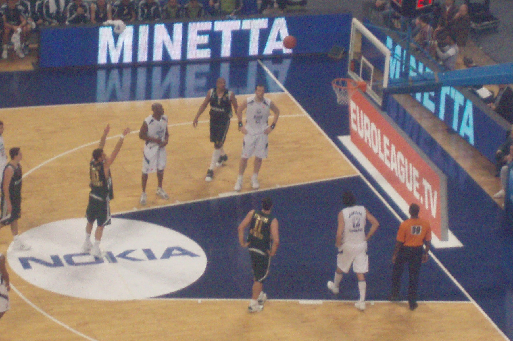 Nikos Hatzivrettas. PAO-EFES